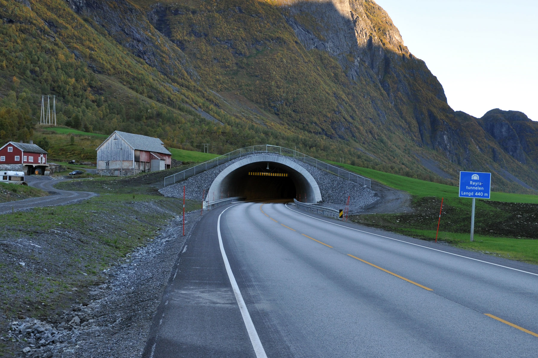 Ras-sikringstunnelen Røyra-tunnelen. Tunnelen er støpt i betong og overdekket med jord. Tunnelen beskytter veien mot Røyrafonna som ofte raser ned der om vinteren.